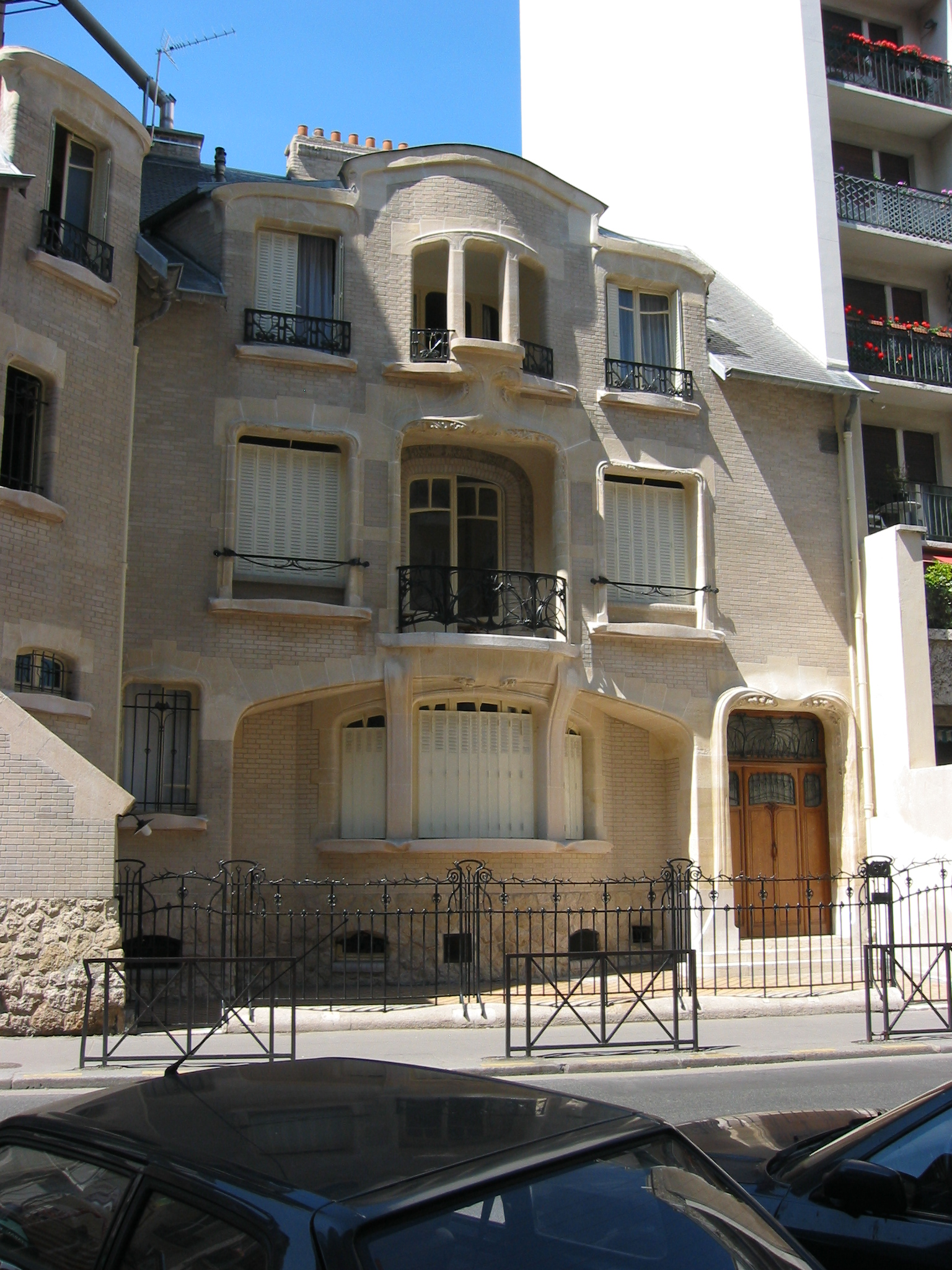 Paris - Hotel Mezzara (2)